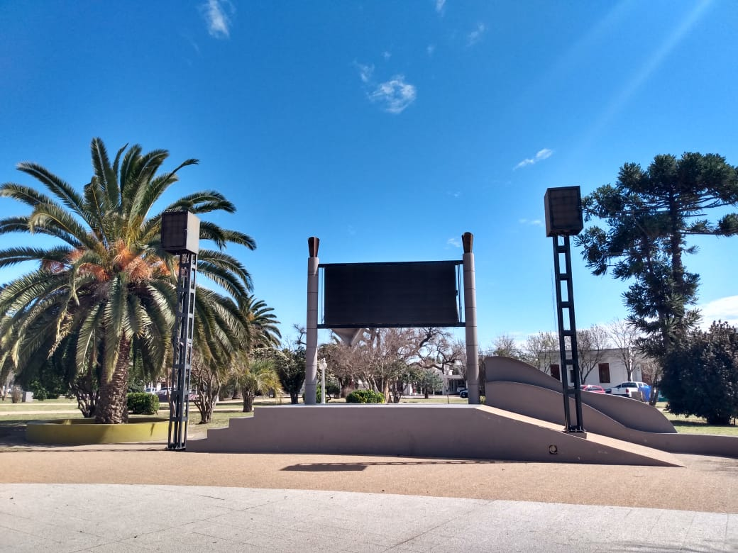 Plaza Ypolito Yrigoyen